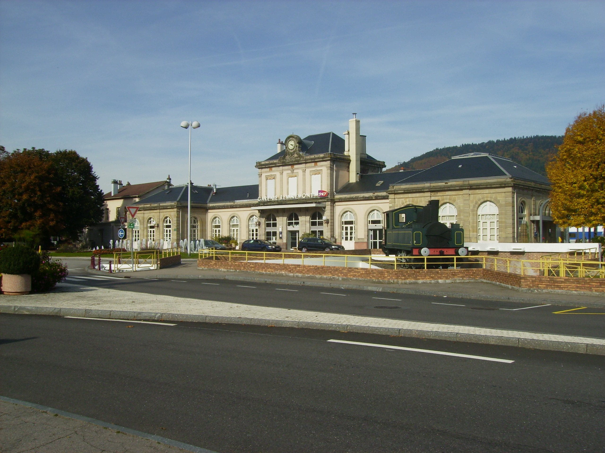 Place des Martyrs de la Résistance à Remiremont (Vosges, France)qui est la place se situant devant la gare de Remiremont.